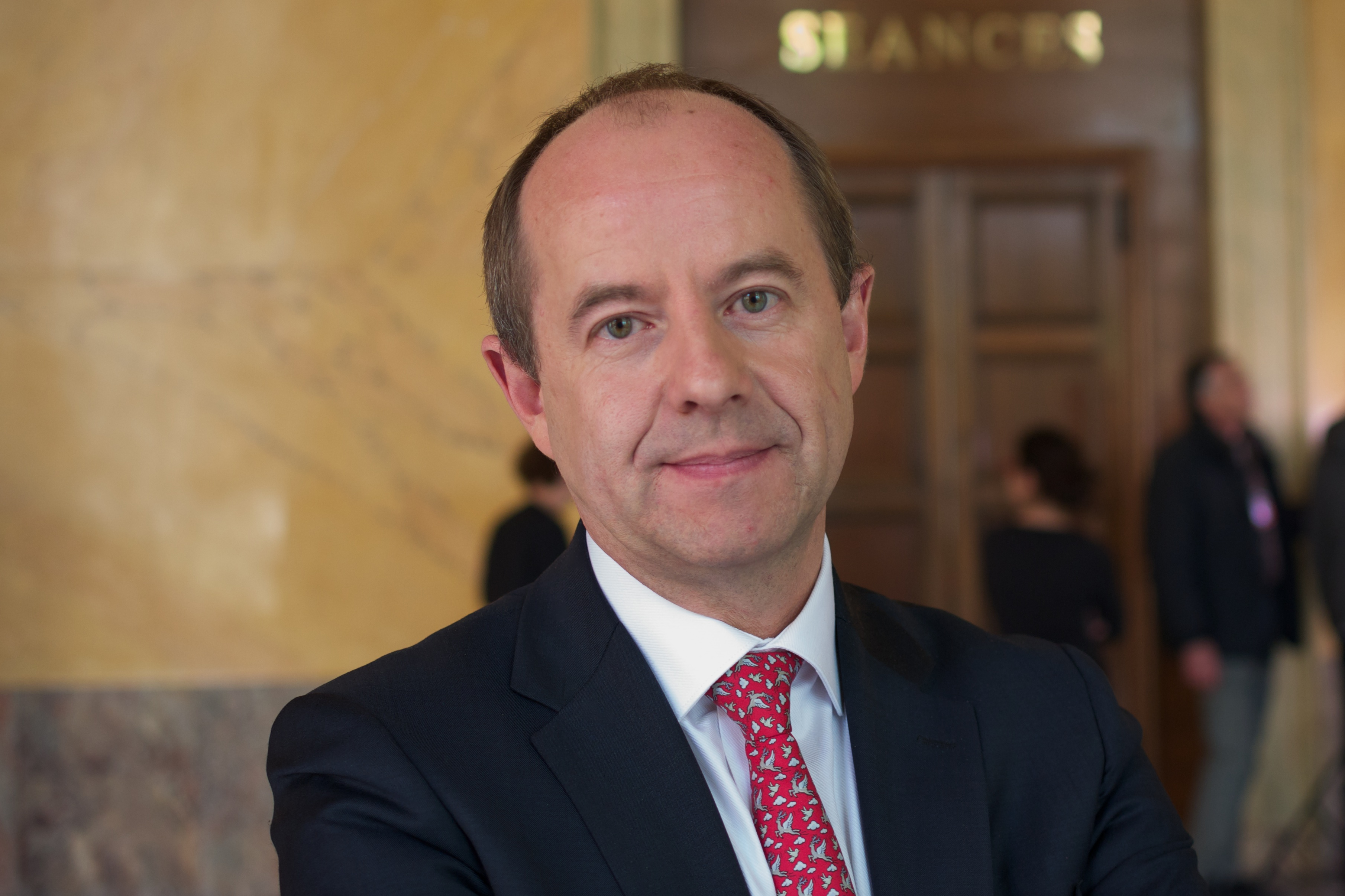 Jean-Jacques Urvoas